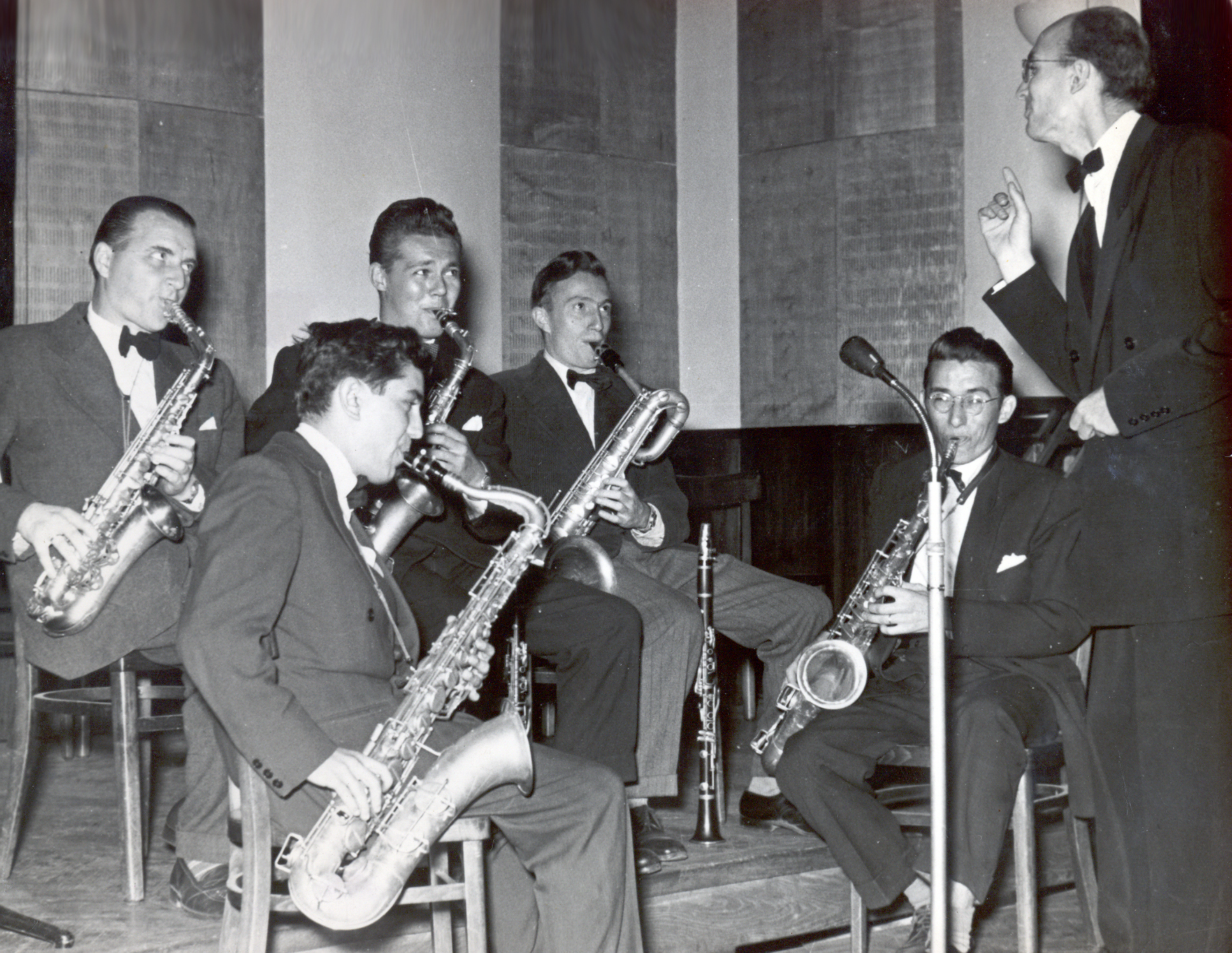 Srpskohrvatski / српскохрватски: roba orkestra 1952. U gornjem redu: Vladimir Plotnjikov, Vladimir Dajzinger, Mika Živanović. U donjem redu: Eduard Sađil i Karlo Takač. Diriguje Mladen Guteša.